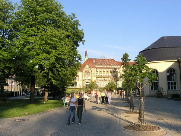 Kudowa-Zdroj, Poland. View on spa park. It's my own photo. 2005.07.12 Drozdp 17:29, 21 July 2005 (UTC)